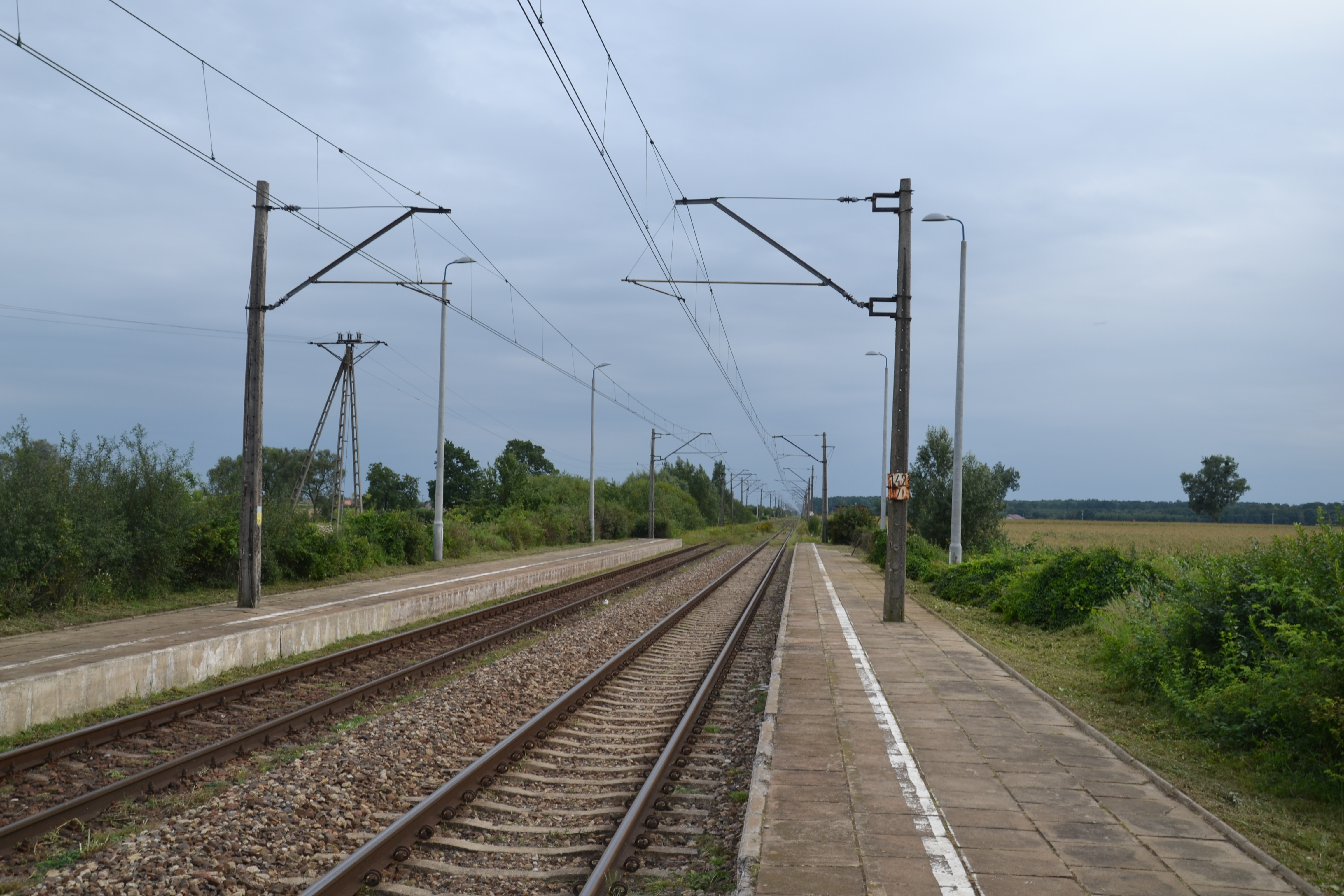 Widok szlaku w kierunku Jarocina